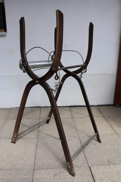 Gerät zur Herstelung von Reisigbündel.